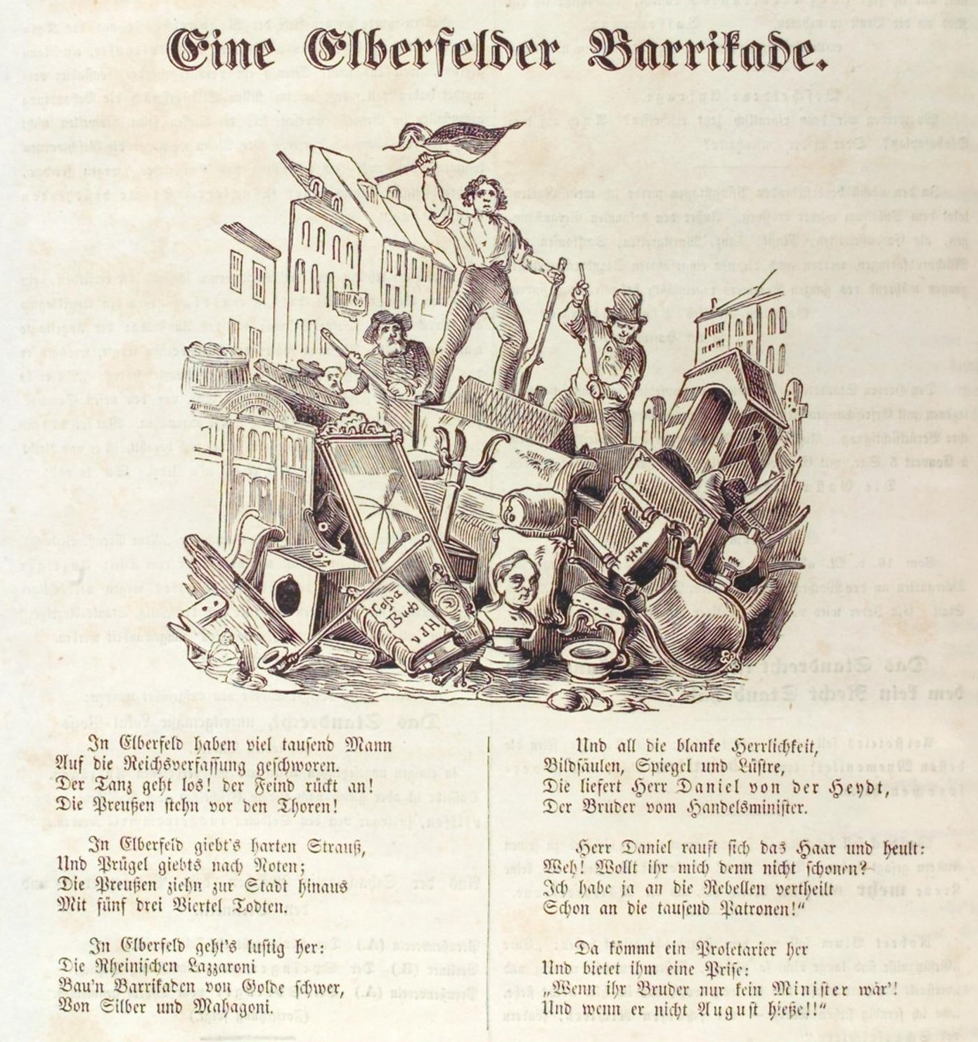 Karikatur des Elberfelder Aufstand von 1849 in der Satirezeitschrift Kladderadatsch